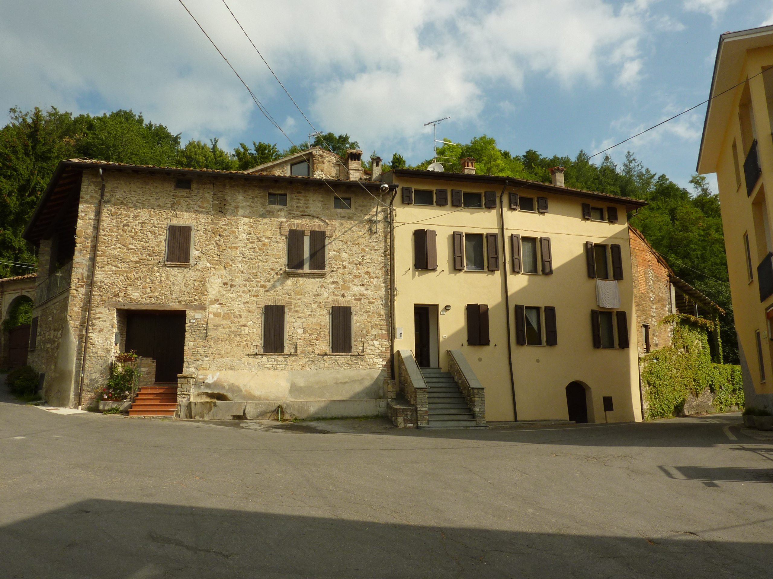 Veduta di Castrignano Costa (Langhirano, Parma).